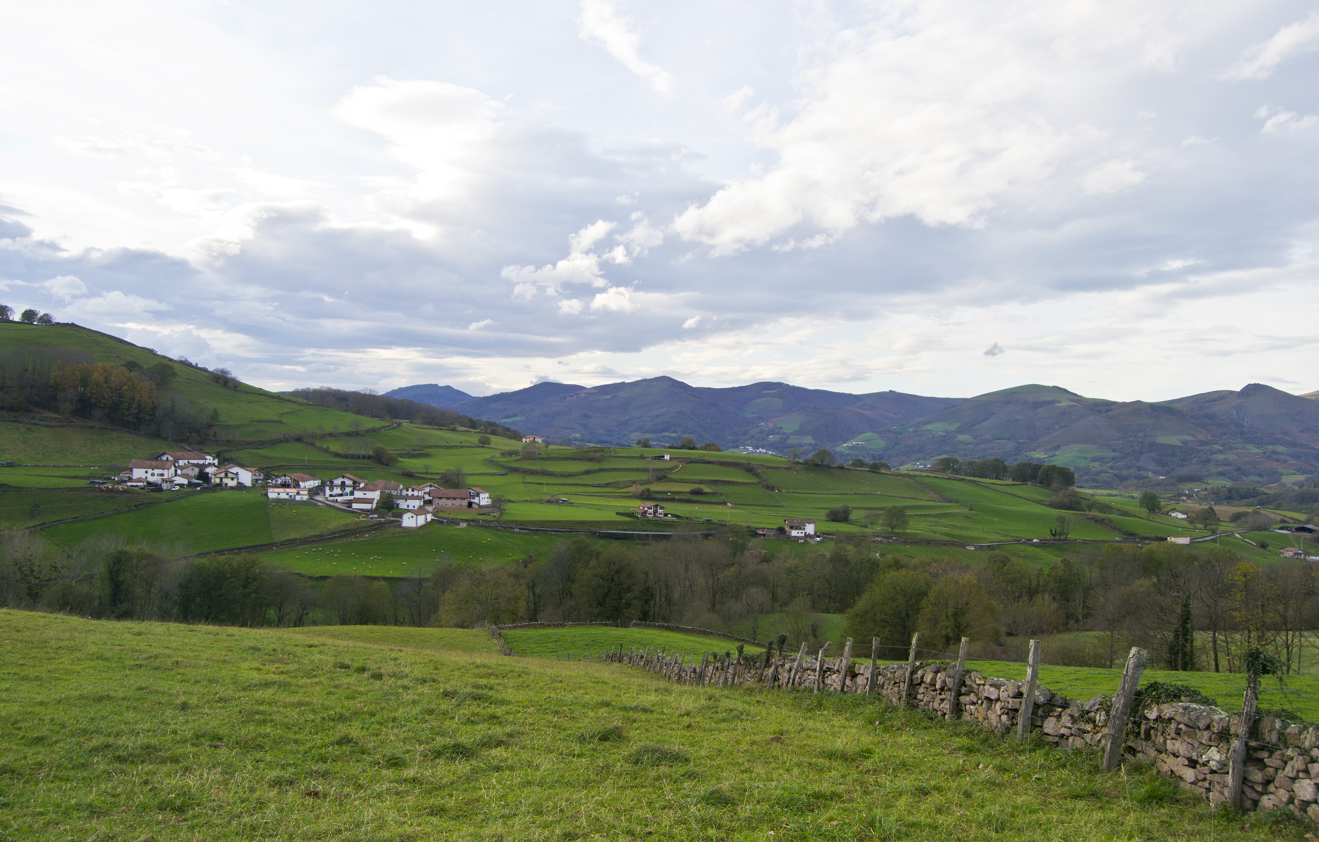 Gorostapalo, Erratzu. Baztan, Nafarroa. Euskal Herria. Gorostapalo, Erratzu. Baztan, Navarre. Basque Country.